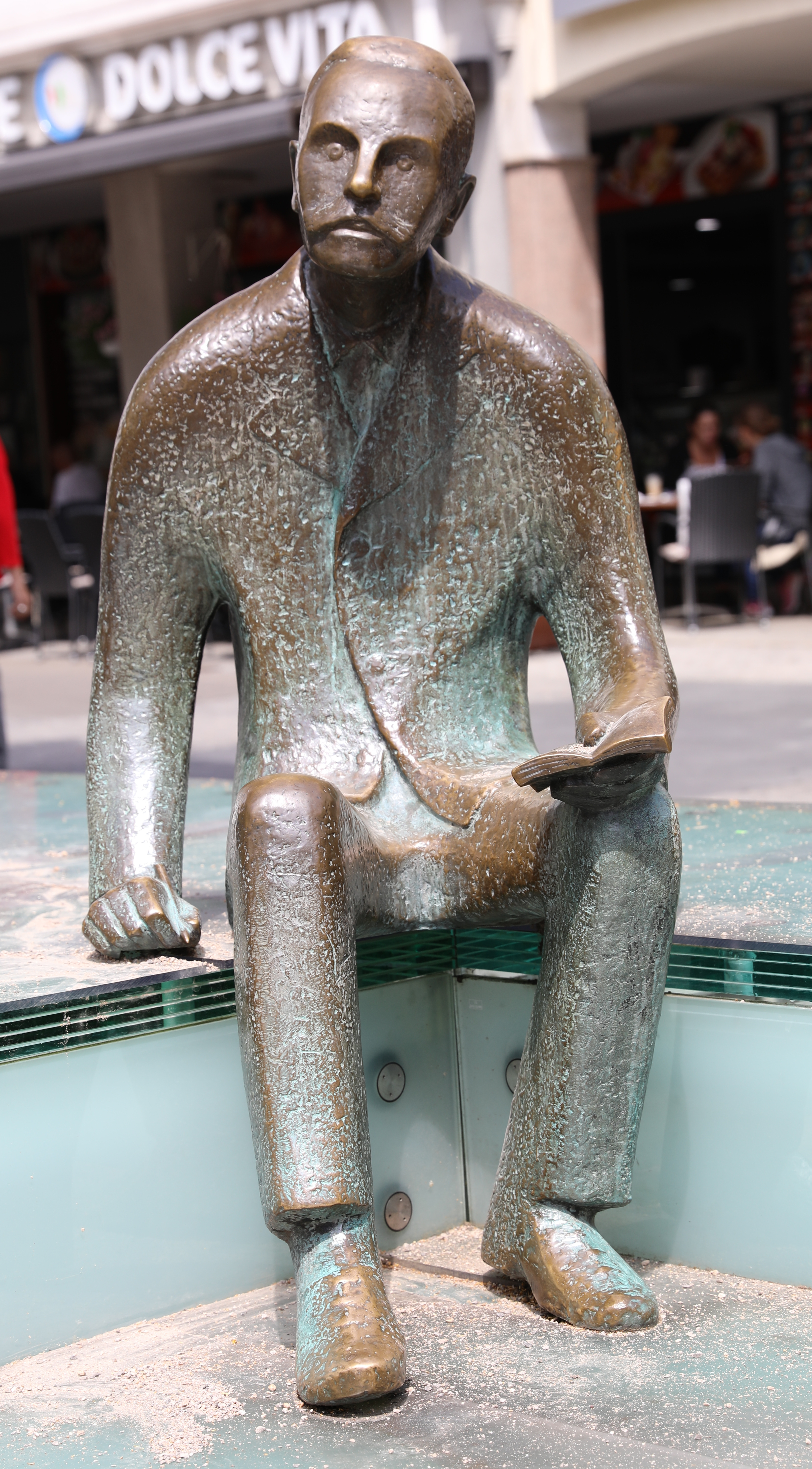 Peter-Witte-Denkmal in Solingen am Alten Markt, von Lies Ketterer